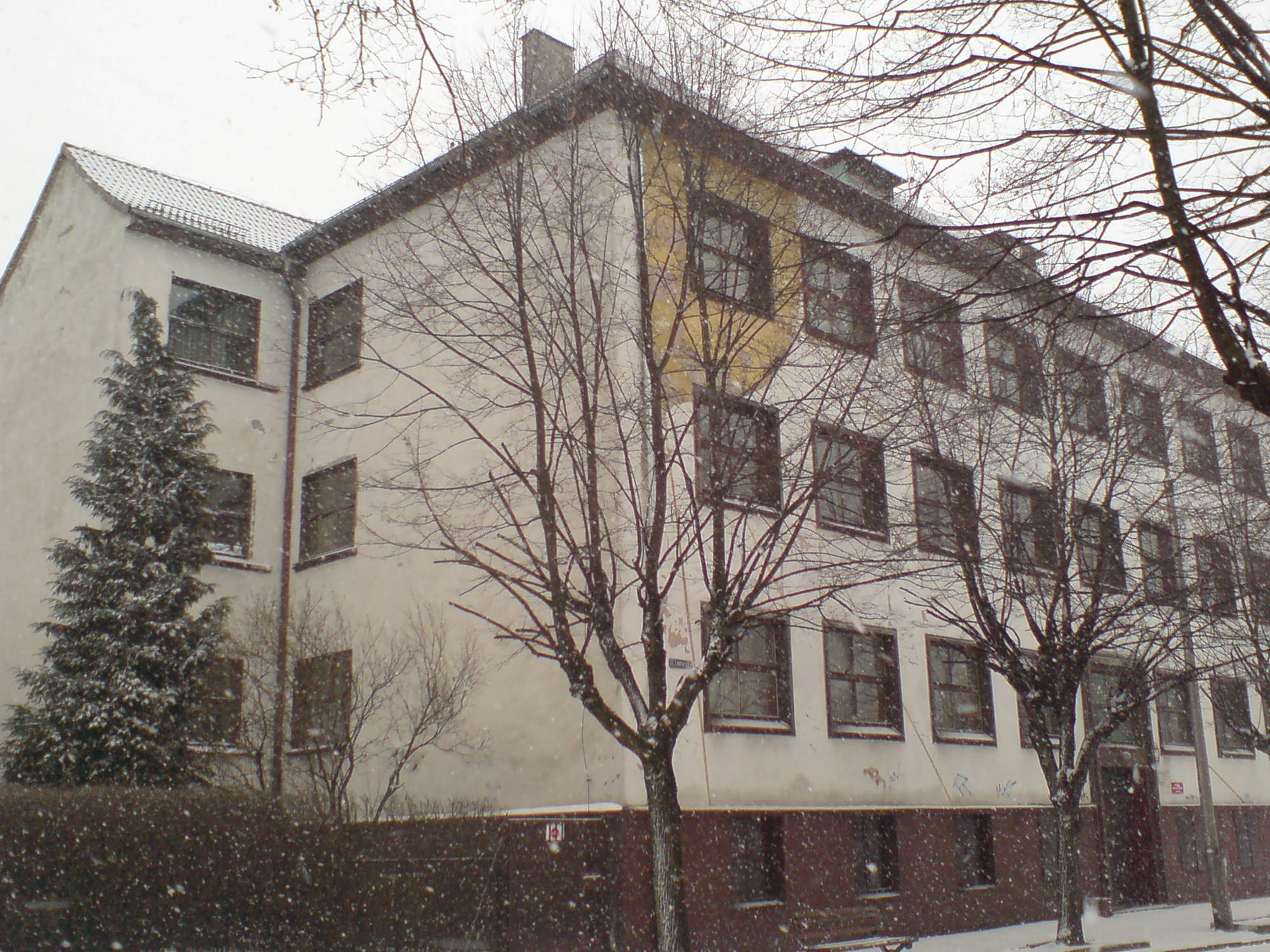 Słoneczko - Szkoła podstawowa na 17, później filia SP 15, a następnie Szkoła prywatna (Racibórz)